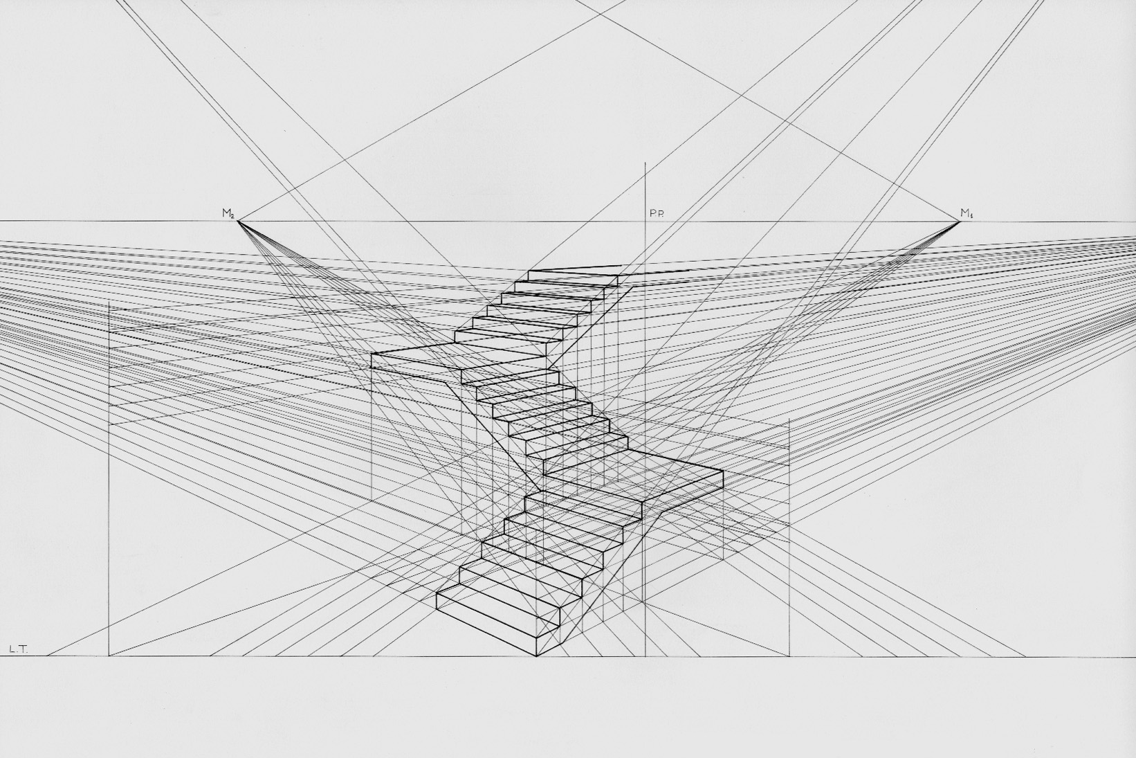 Prospettiva accidentale di una scala a tre rampe, eseguita con il metodo dei punti misuratori. Il file è stato creato scandendo il disegno con uno scanner